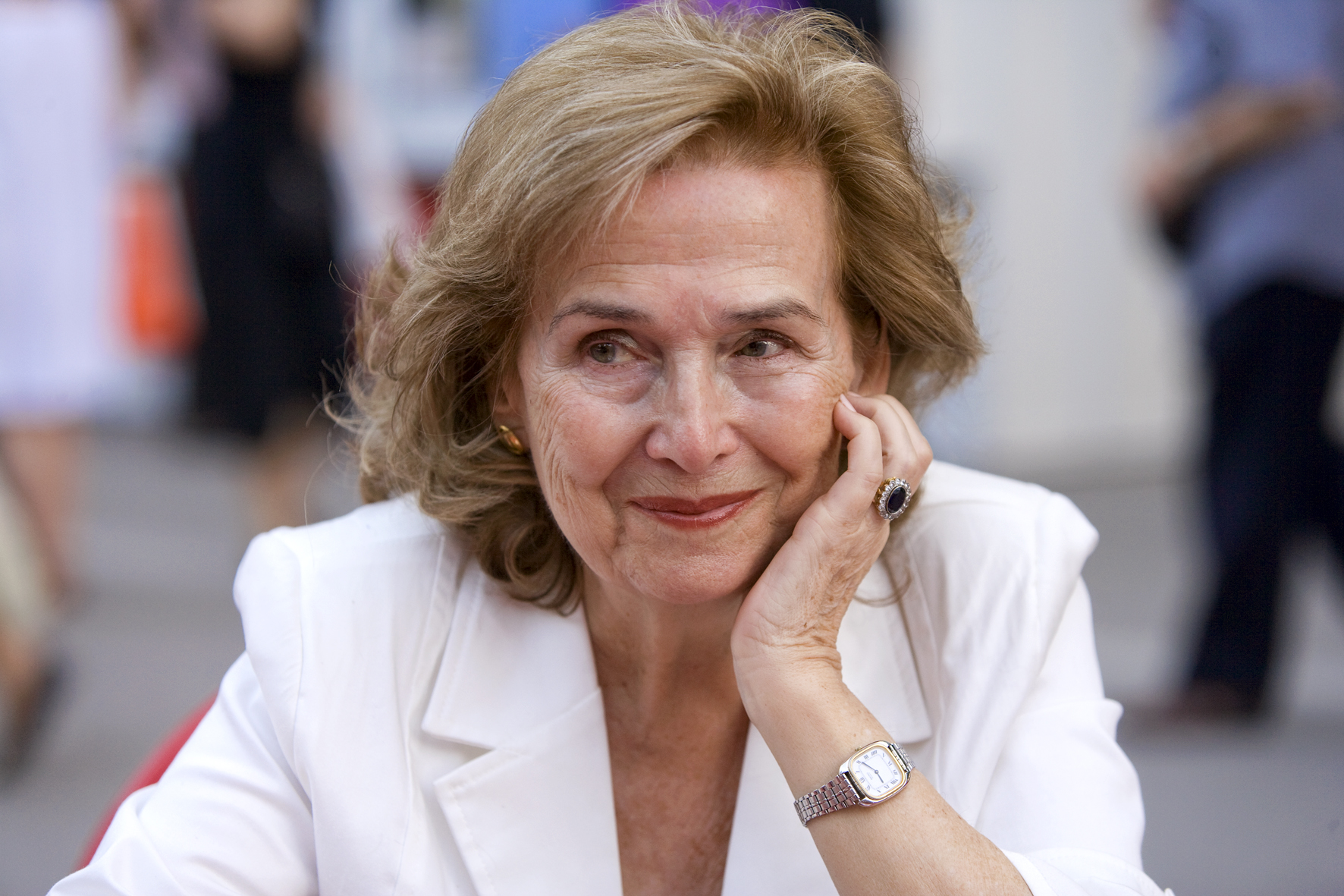 Fotografía de la escritora Angelina Lamelas